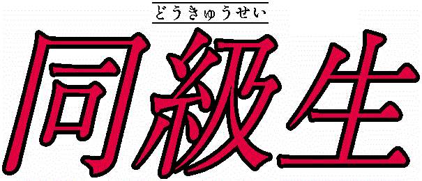 中文（台灣）: 日本十八禁戀愛模擬遊戲《同級生》題字。